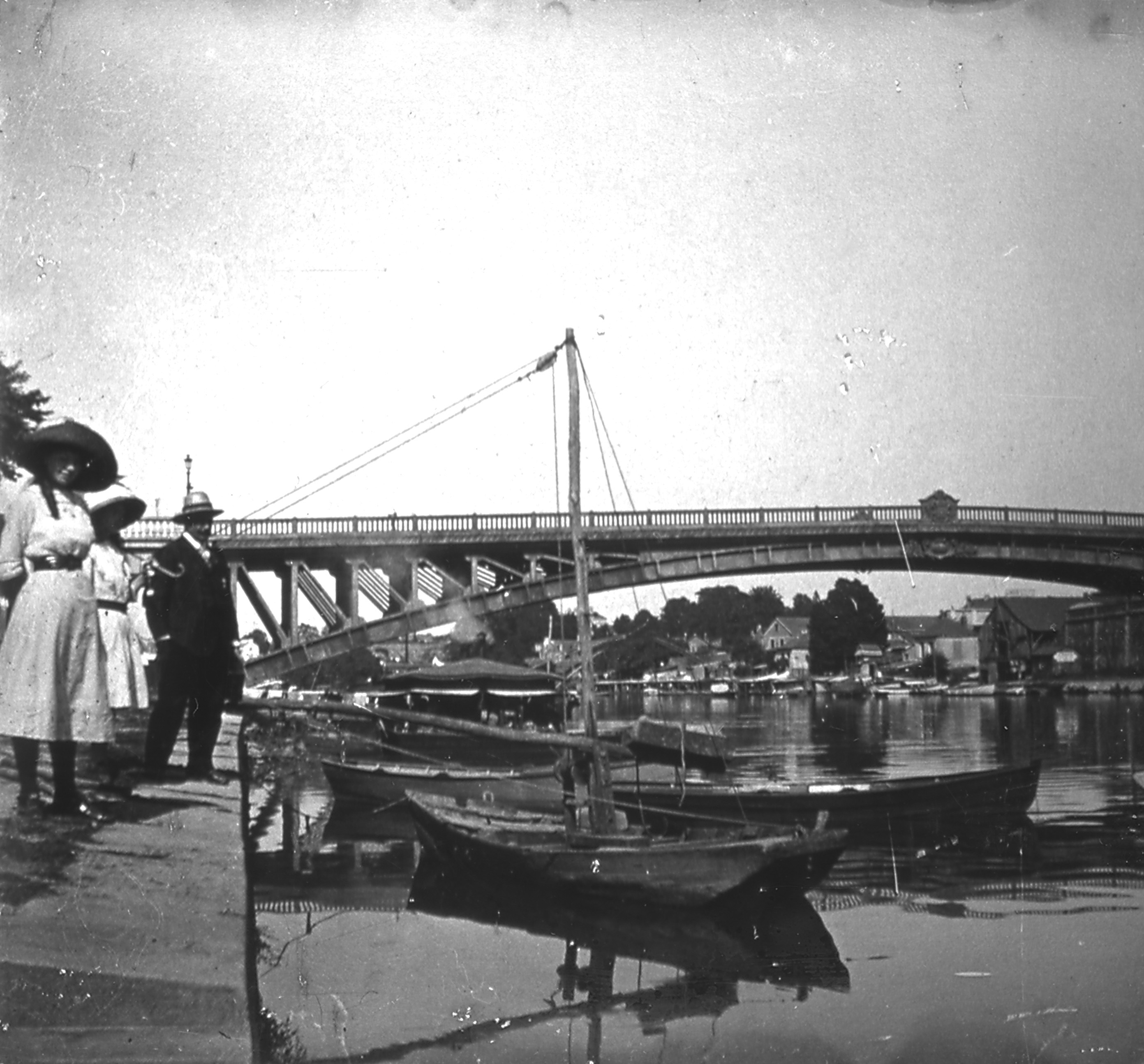 Nantes - Pont de la Motte Rouge - Sur l'Erdre - Photo prise par mon grand-père Maurice Terrien vers 1917